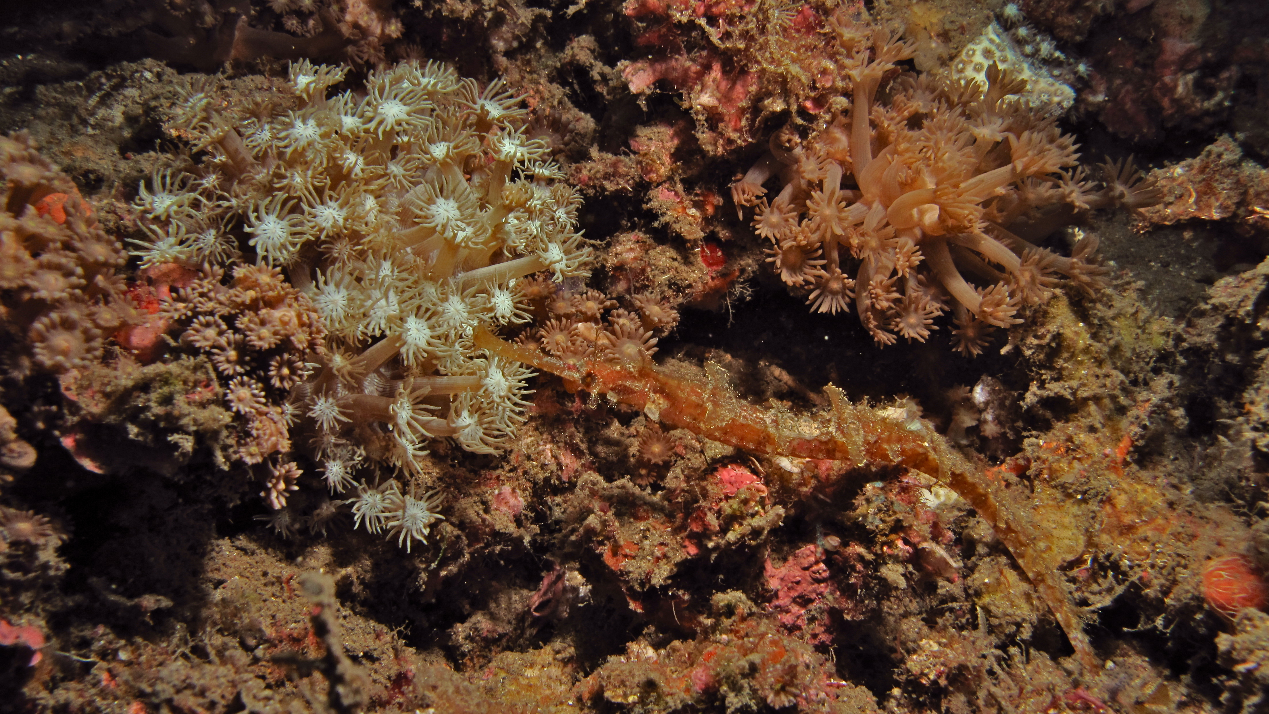 Aer Prang, Lembeh Strait, Sulawesi, INDONESIA